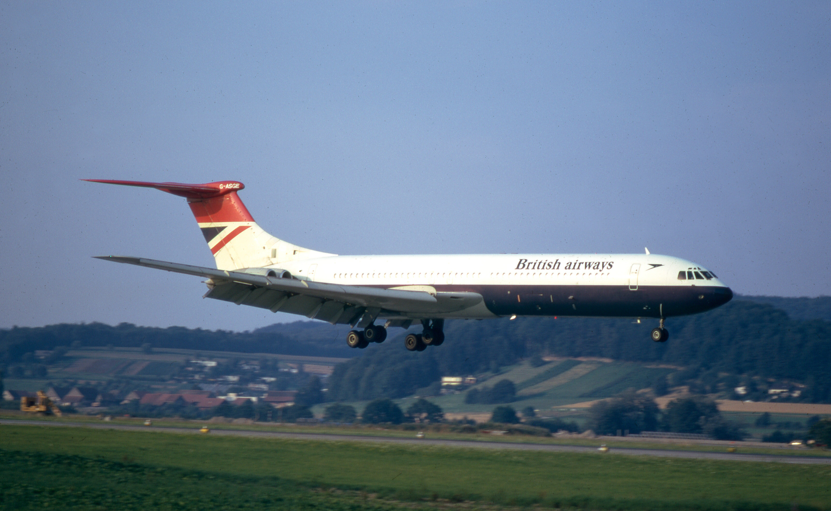 Zurich 1975